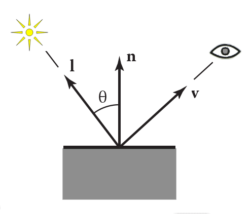 Schema del Lambert shading